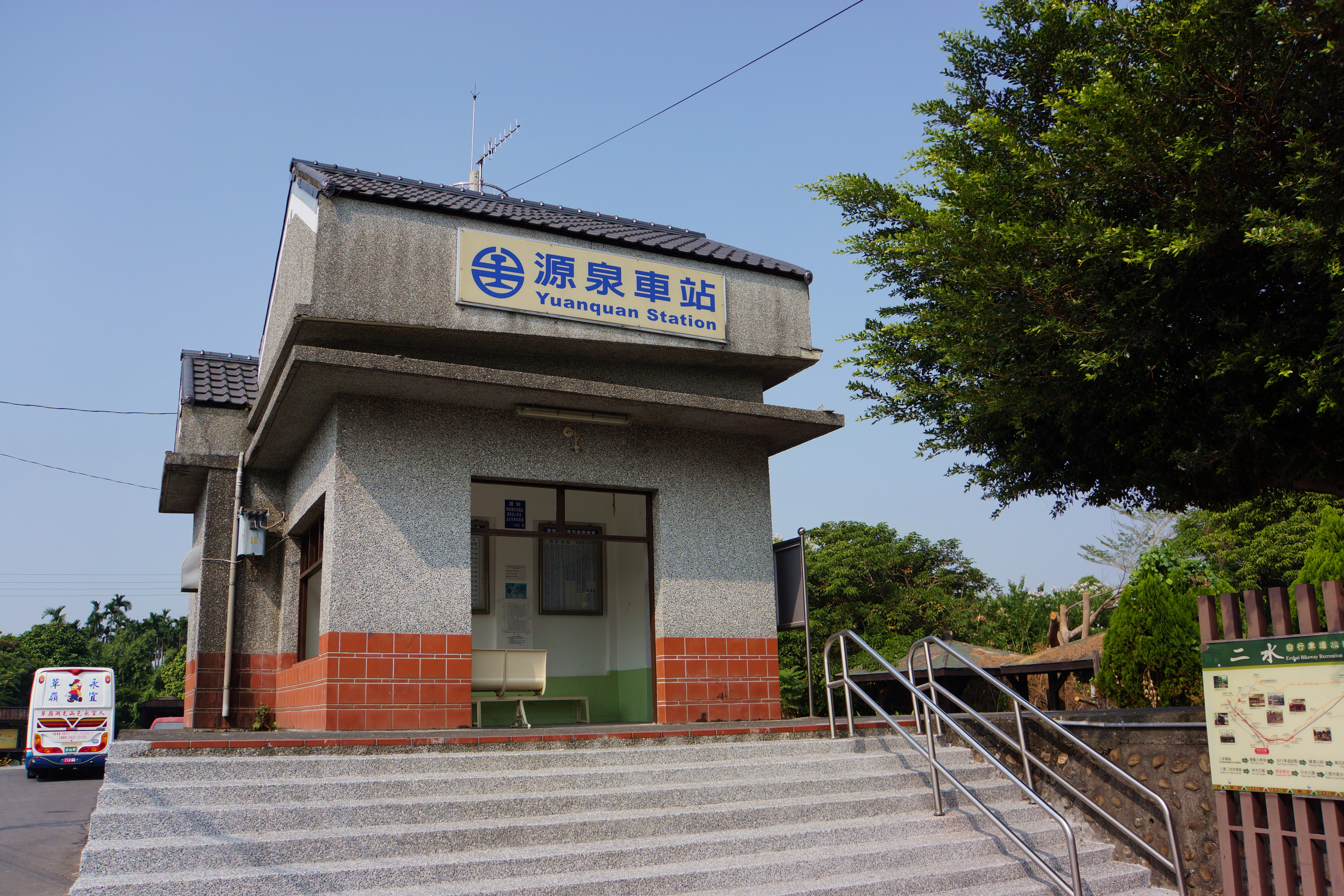 Yuanquan Station 淵泉車站